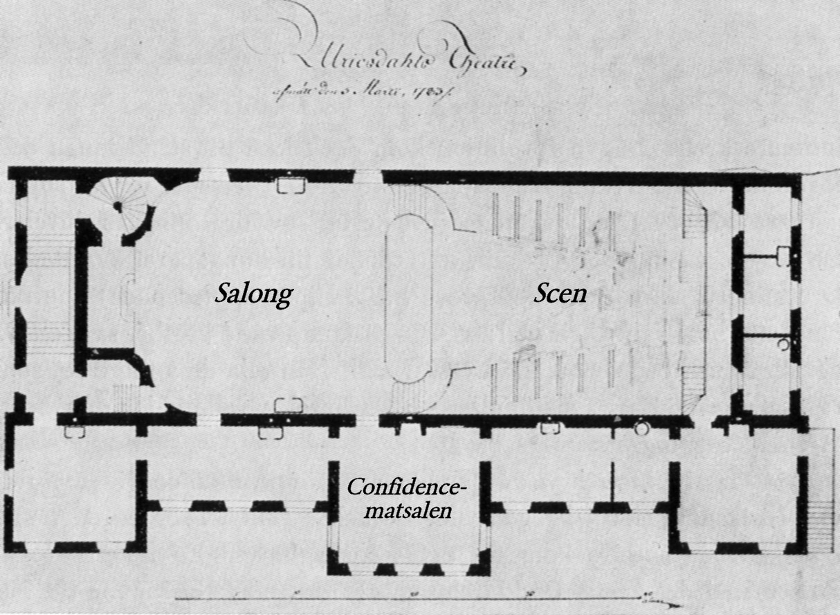 Planritning till Ulriksdals slottsteater "Confidencen"